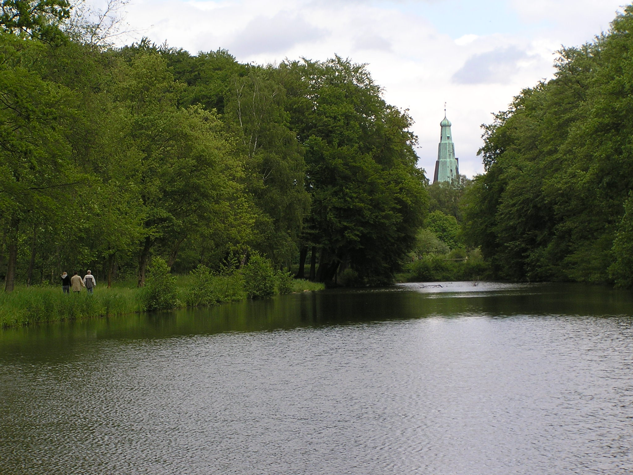 Langer Teich im Tiergarten Schloss Raesfeld